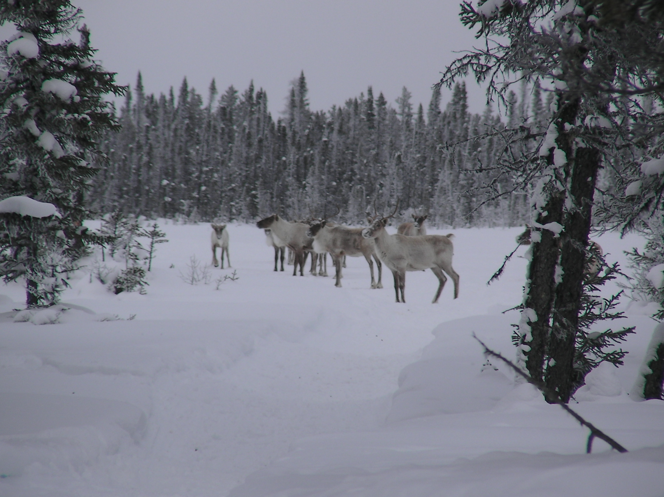 A mon retour au camp.